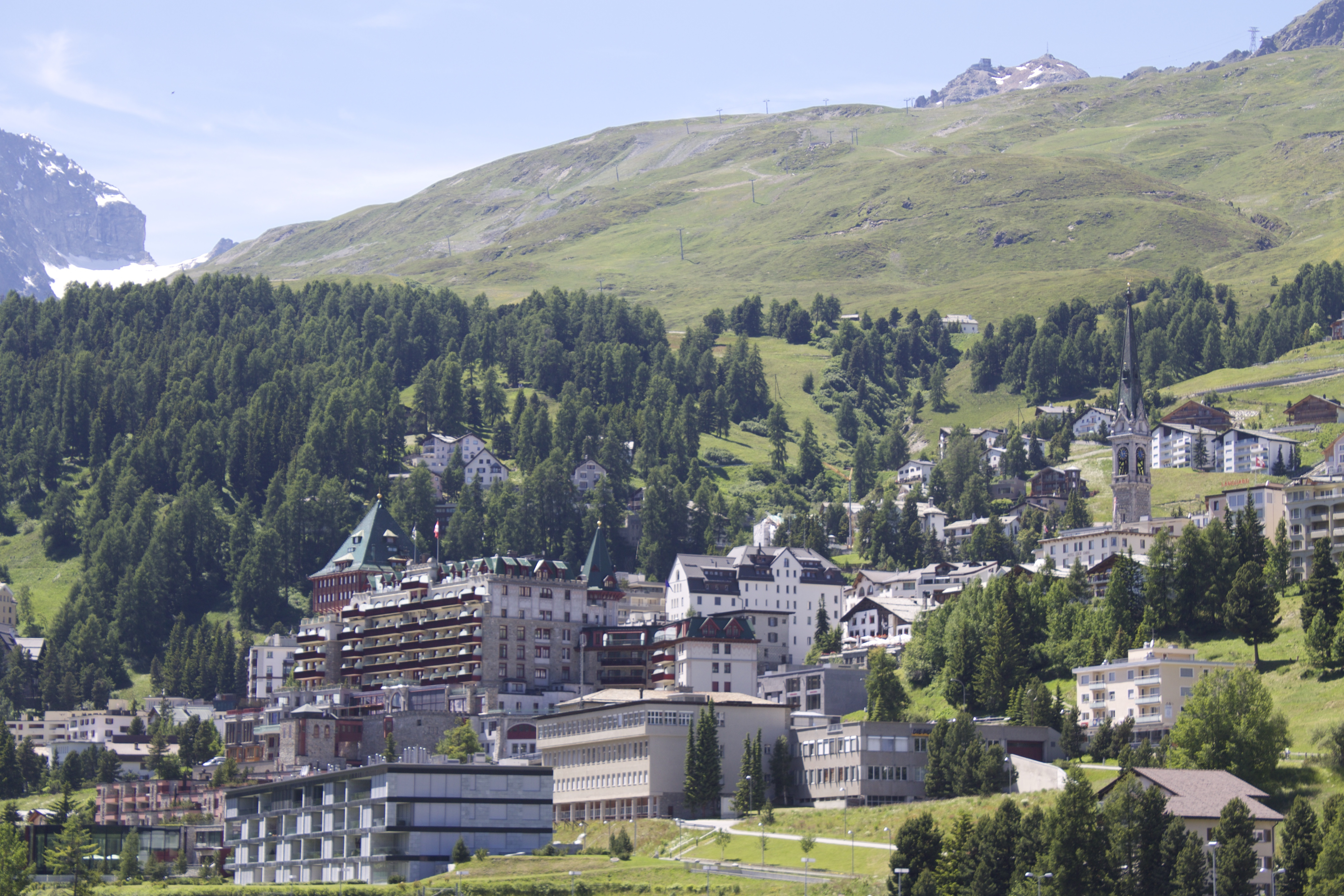 Saint-Moritz